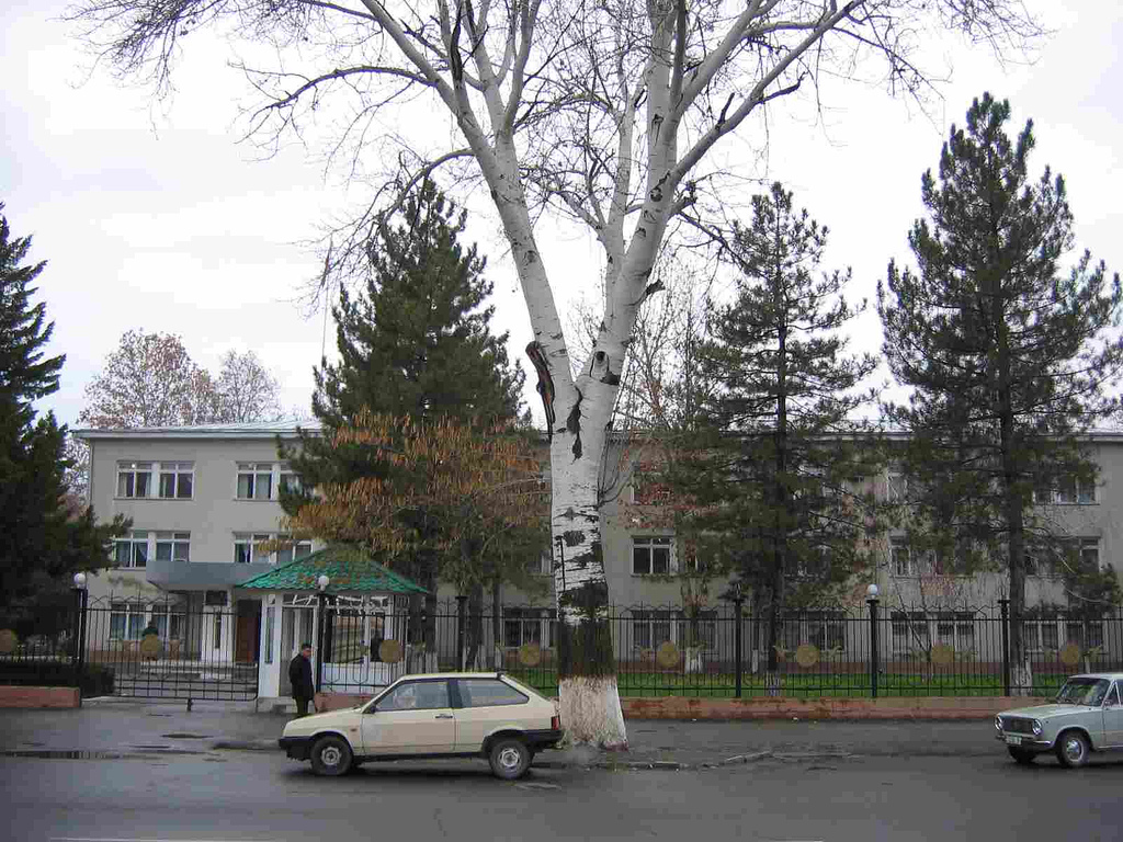 Jalalabad 5